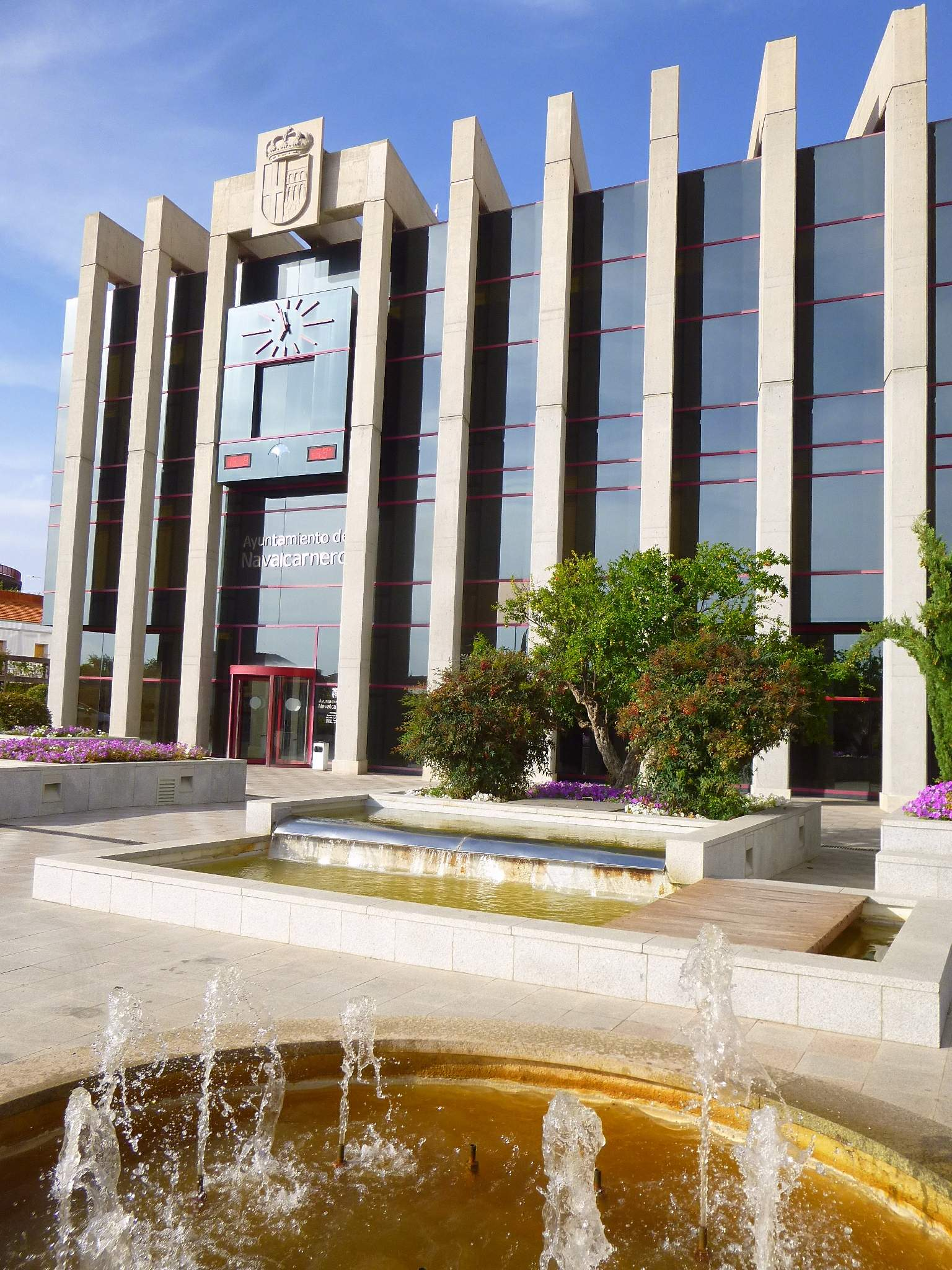 Navalcarnero - Ayuntamiento nuevo